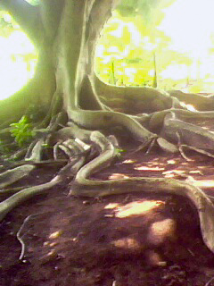 Esssa foto foi tirada dentro do Parque Castro Alves